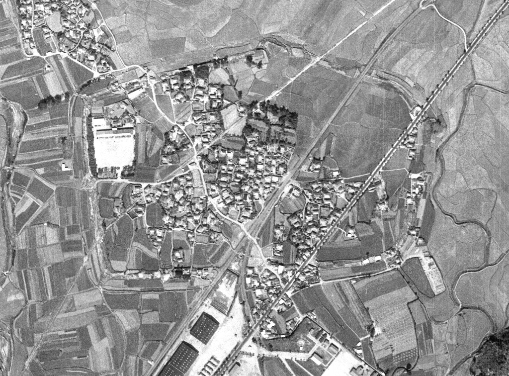 1967년, 경상남도 마산시 합성동 및 합포성지 일대. 국토지리정보원 보관자료